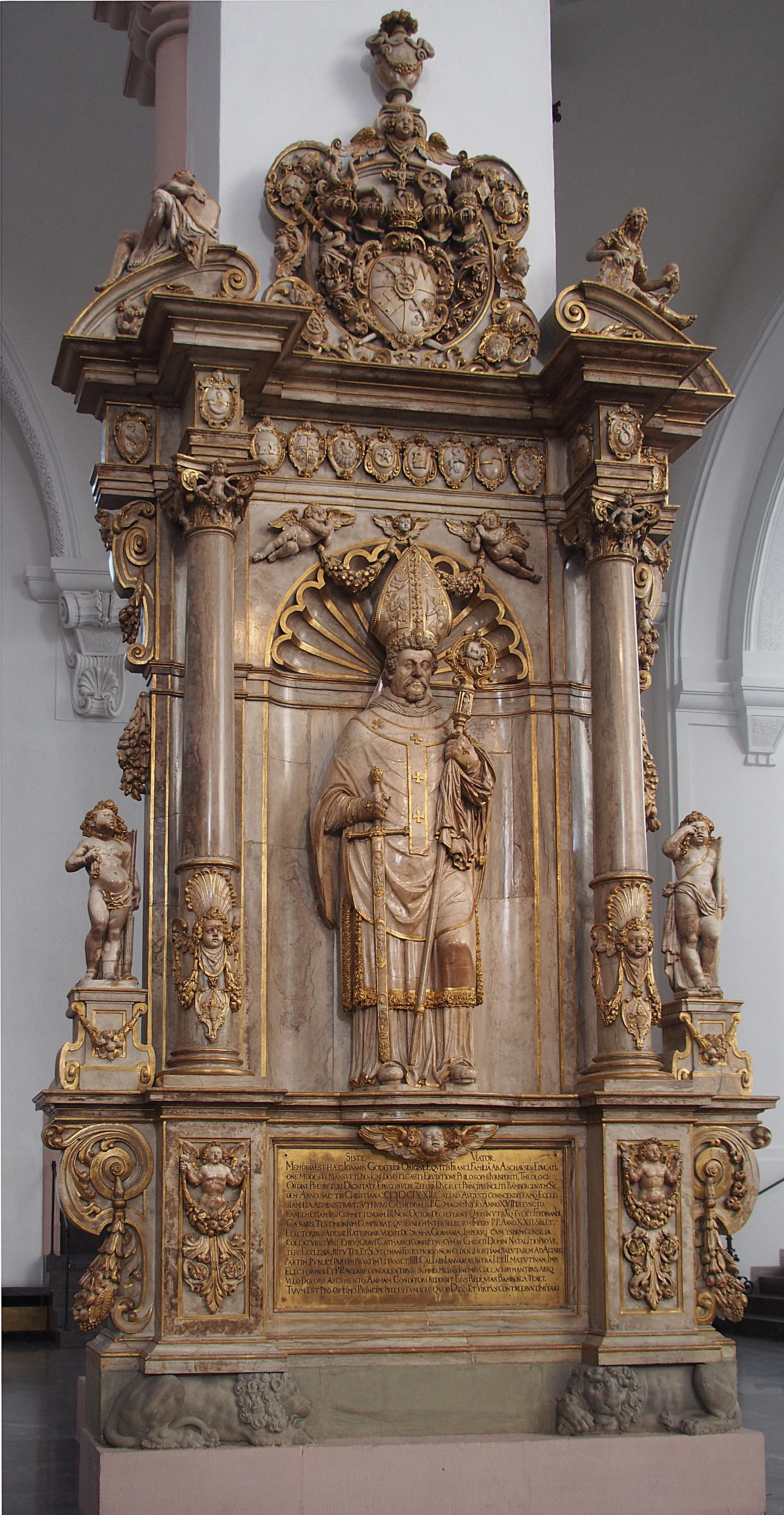 Grabmal Fürstbischofs Johann Gottfried I. von Aschhausen im Würzburger Dom